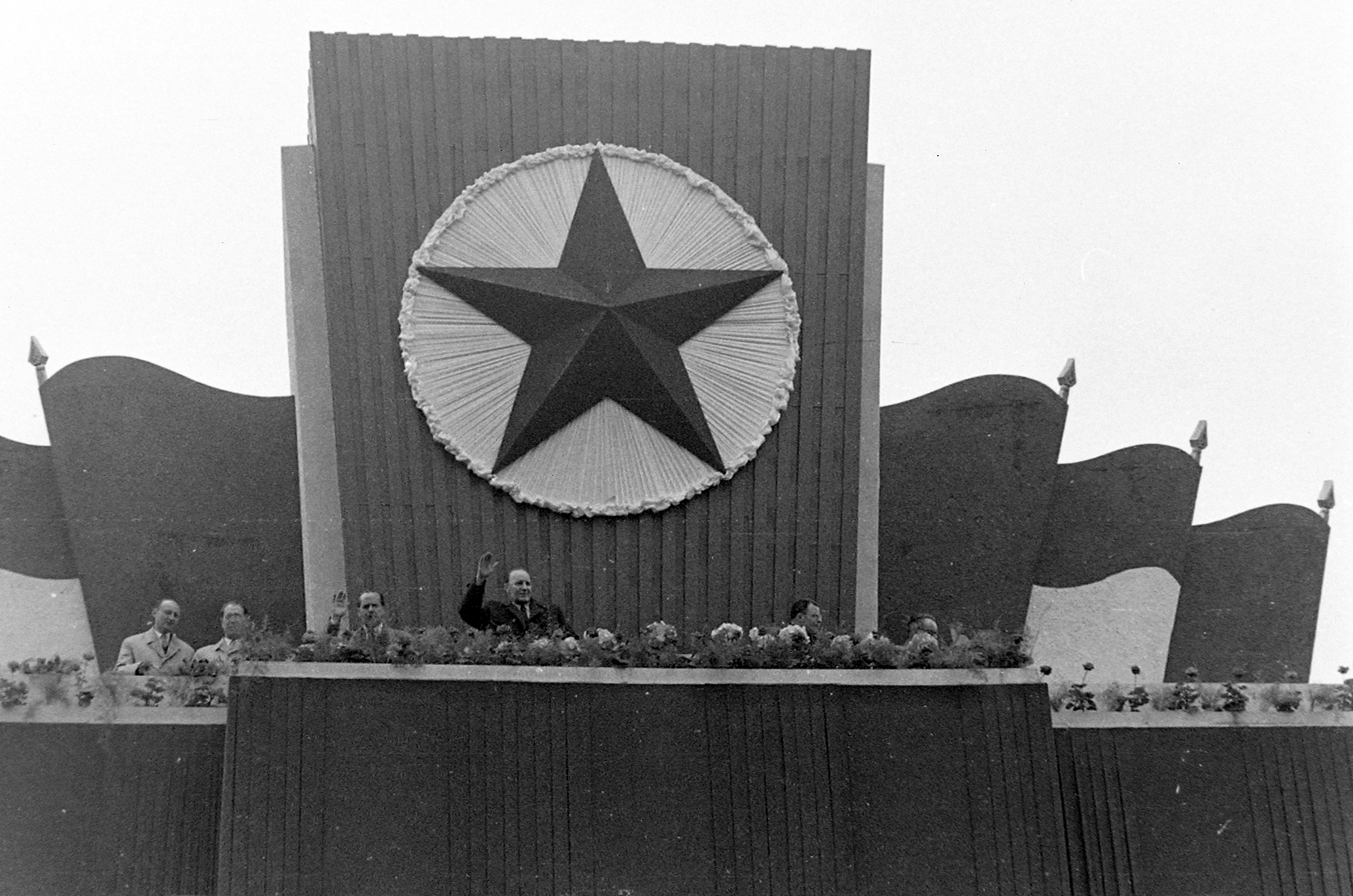 Dózsa György út (Felvonulási tér), május 1-i felvonulás, dísztribün, Kádár János. Location: Hungary, Budapest Tags: 1st of May parade, celebrity Title: Dózsa György út (Felvonulási tér), május 1-i felvonulás, dísztribün, Kádár János.